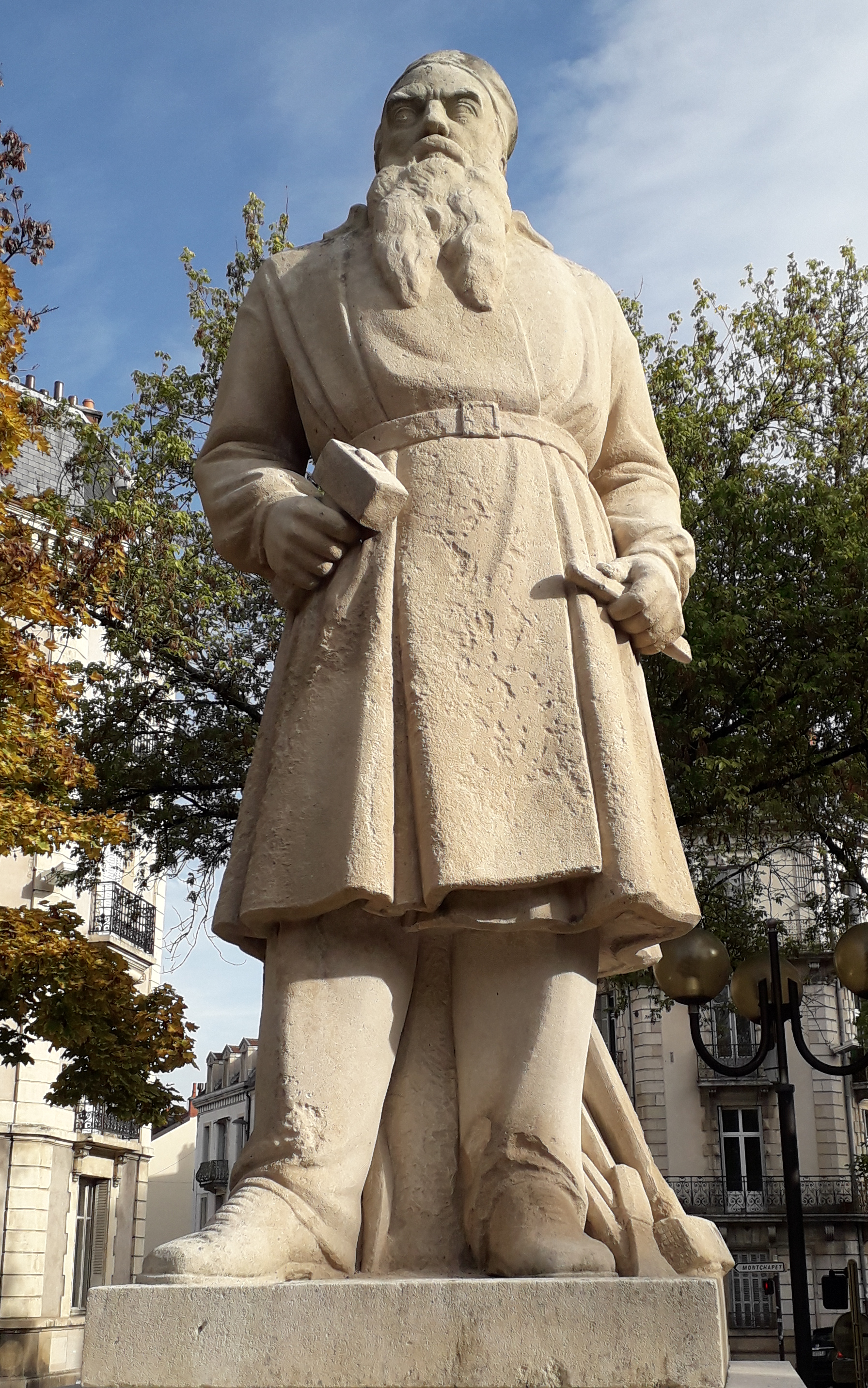 Statue de François Rude, marteau et ciseau à la main, sur son socle place Auguste Dubois à Dijon, au bord de l'avenue Victor Hugo et à proximité du Jardin Darcy.